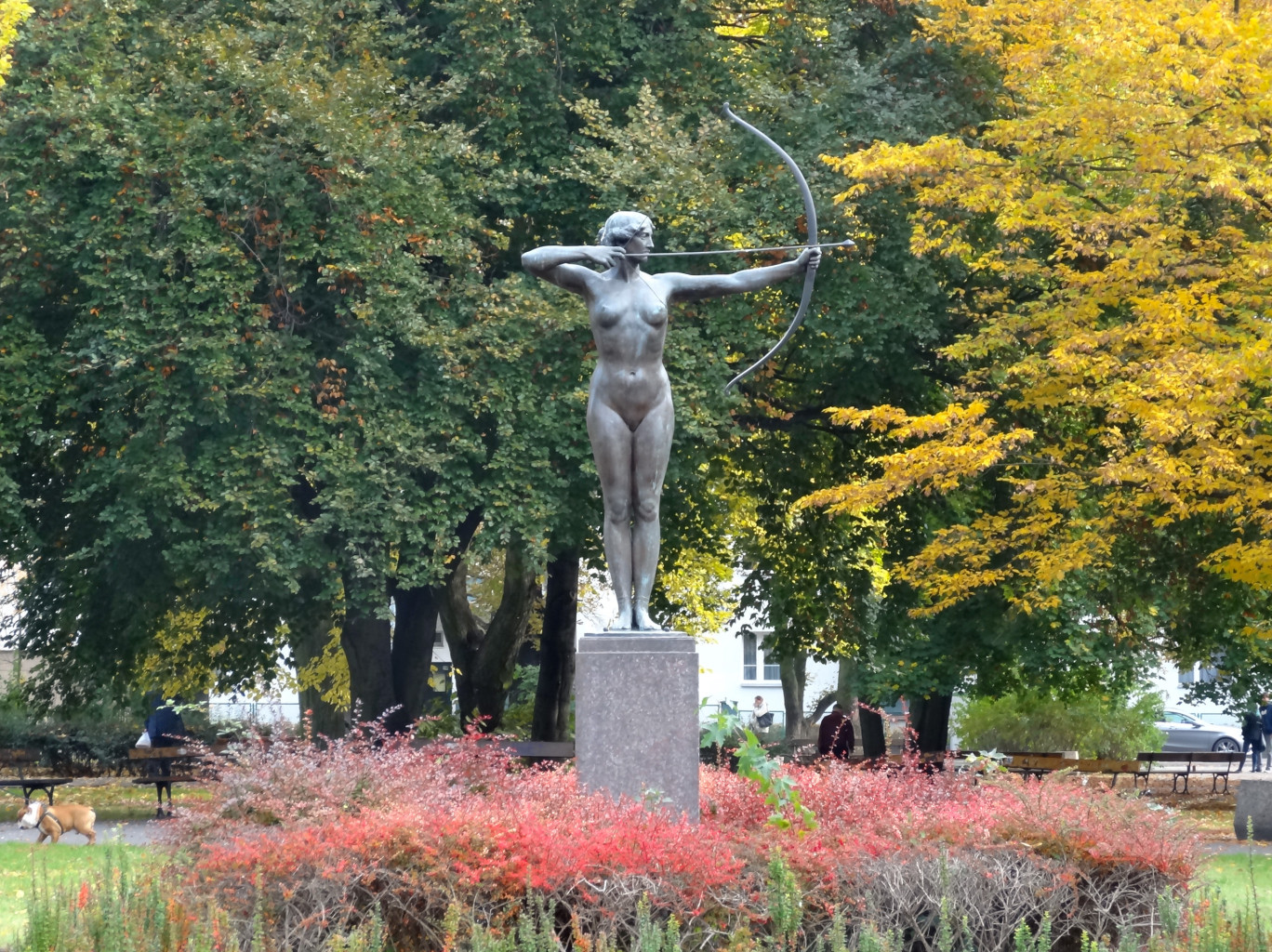 Rzeźba Łuczniczki autorstwa prof. Ferdinanda Lepcke odsłonięta w 1910 r. w Bydgoszczy